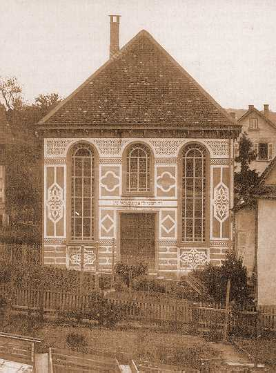 Tübinger Synagoge, gebaut 1882, zerstört während der Reichskristallnacht (9. November 1938)